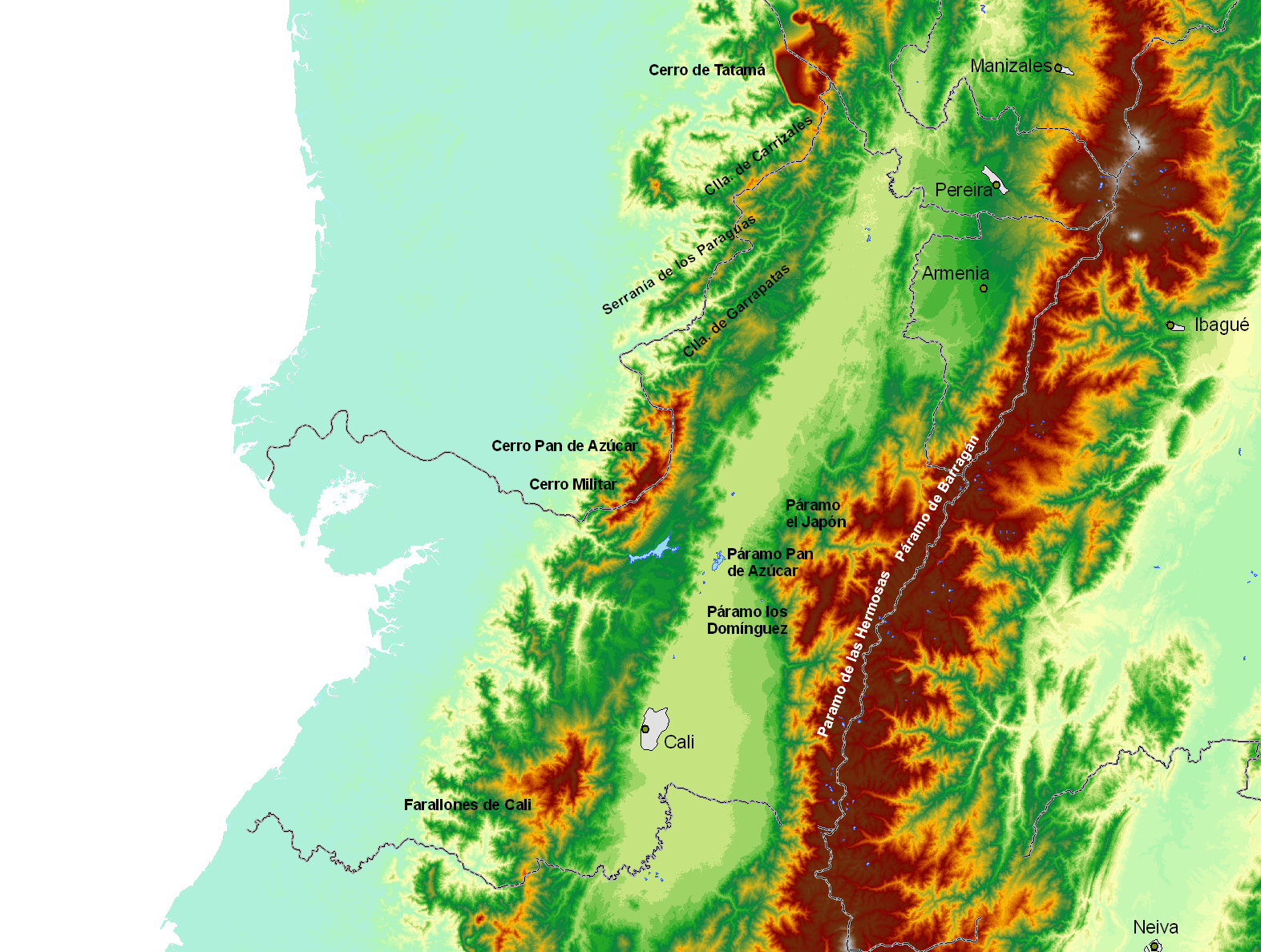 Relieve Valle del Cauca, Colombia